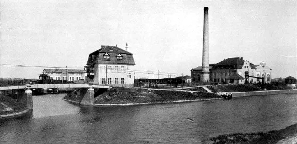 Bauhof des Teltowkanals in Berlin-Zehlendorf